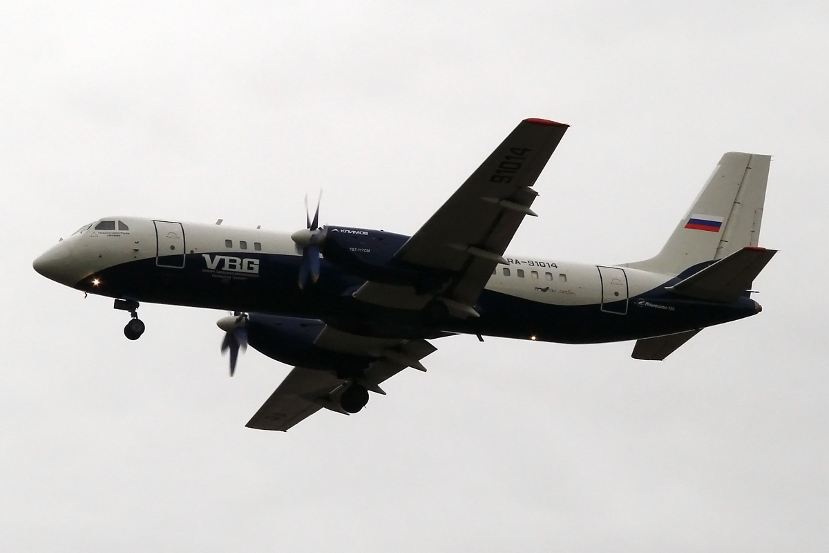 Vyborg Ilyushin Il-114